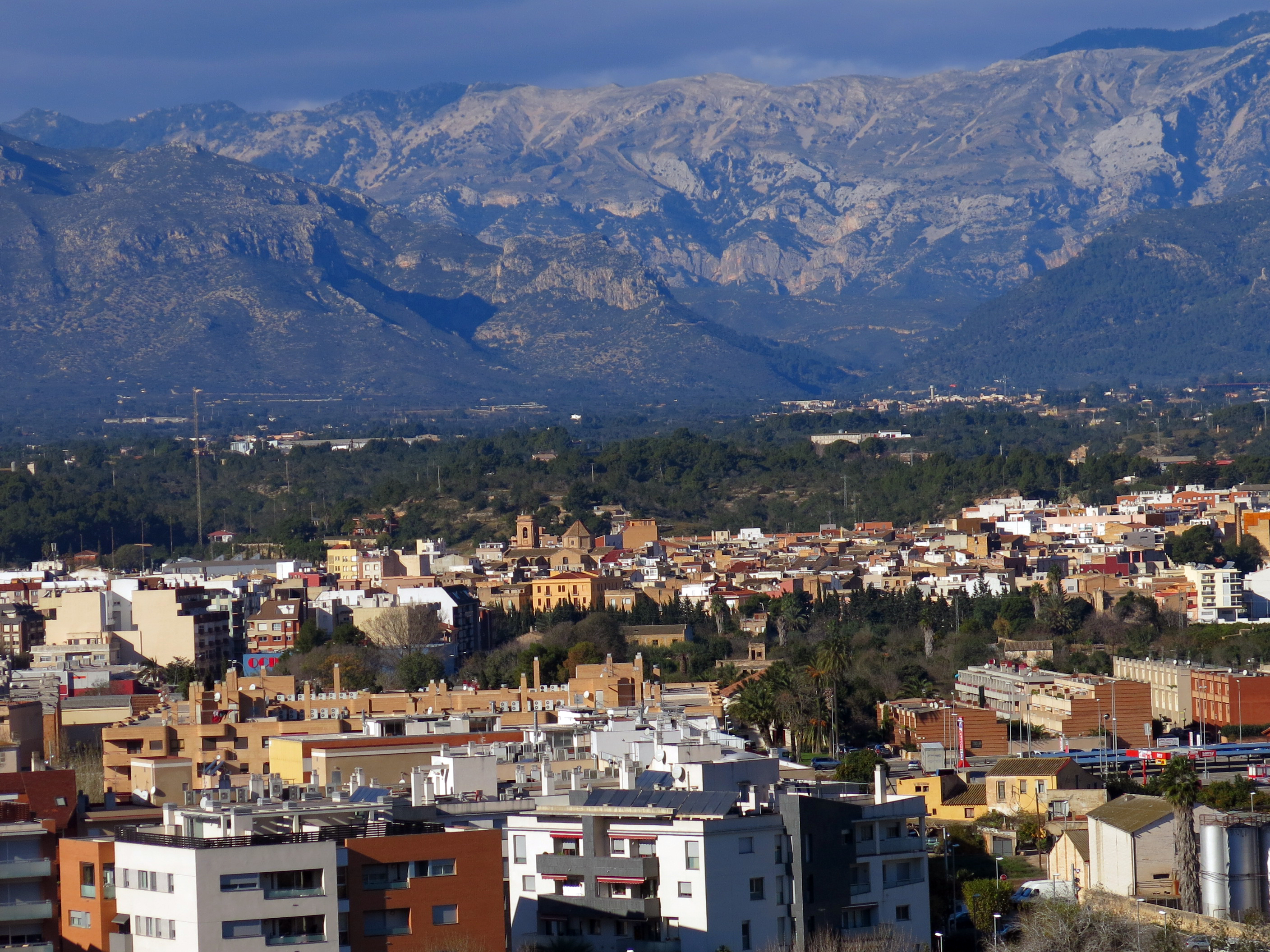 Roquetes i el massís del Port, des del castell de la Suda (Tortosa) This is a a photo of a natural area in Catalonia, Spain, with id: ES510154